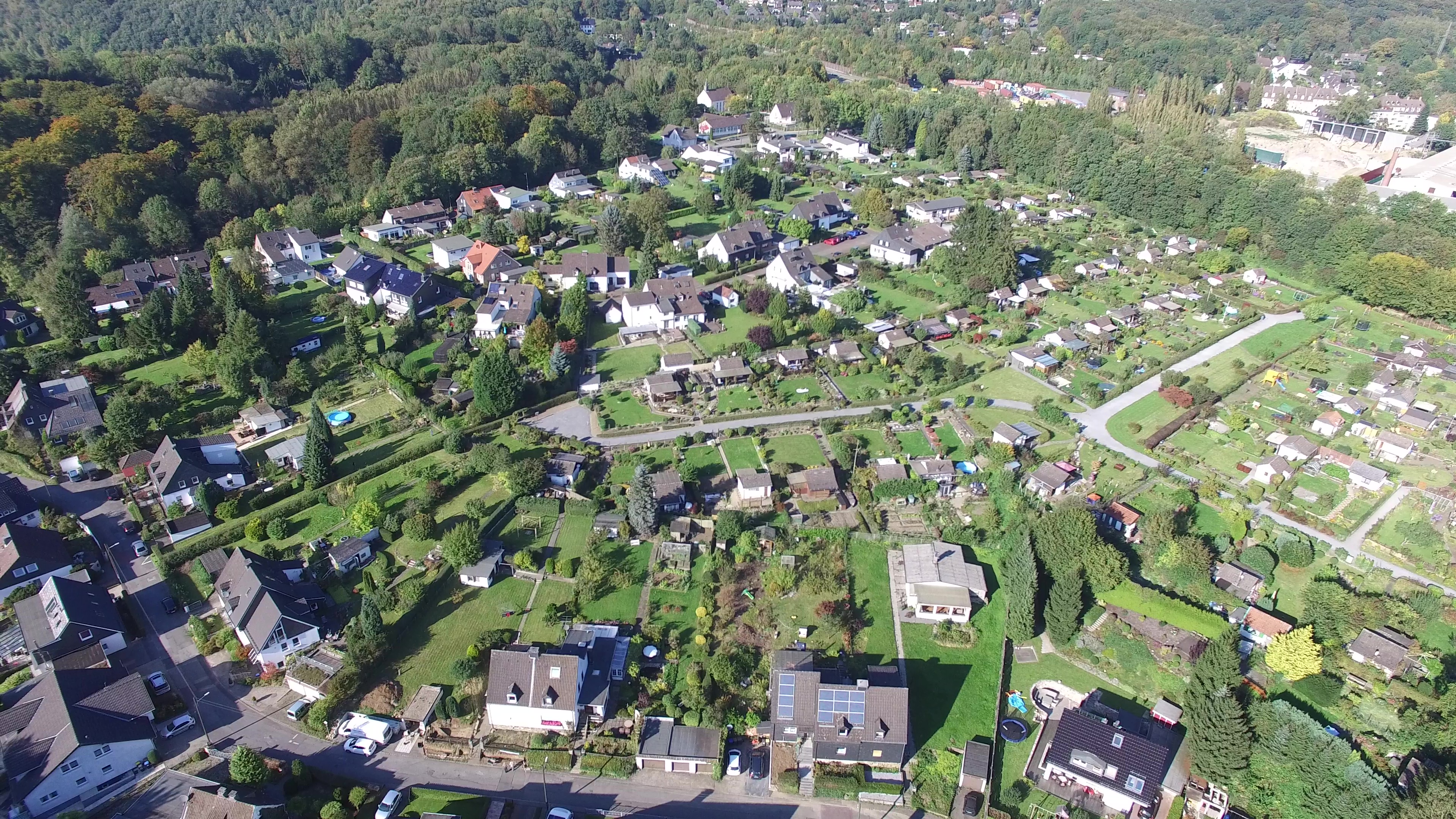 Wuppertaler Ortsteil und Siedlung (Am) Oberst mit ev. Markuskirche